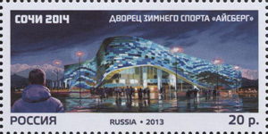 XXII Олимпийские зимние игры 2014 года в г. Сочи. Олимпийские спортивные объекты